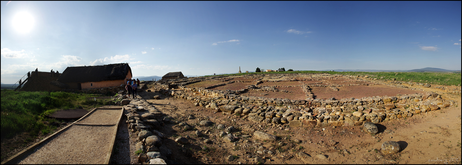 Numancia